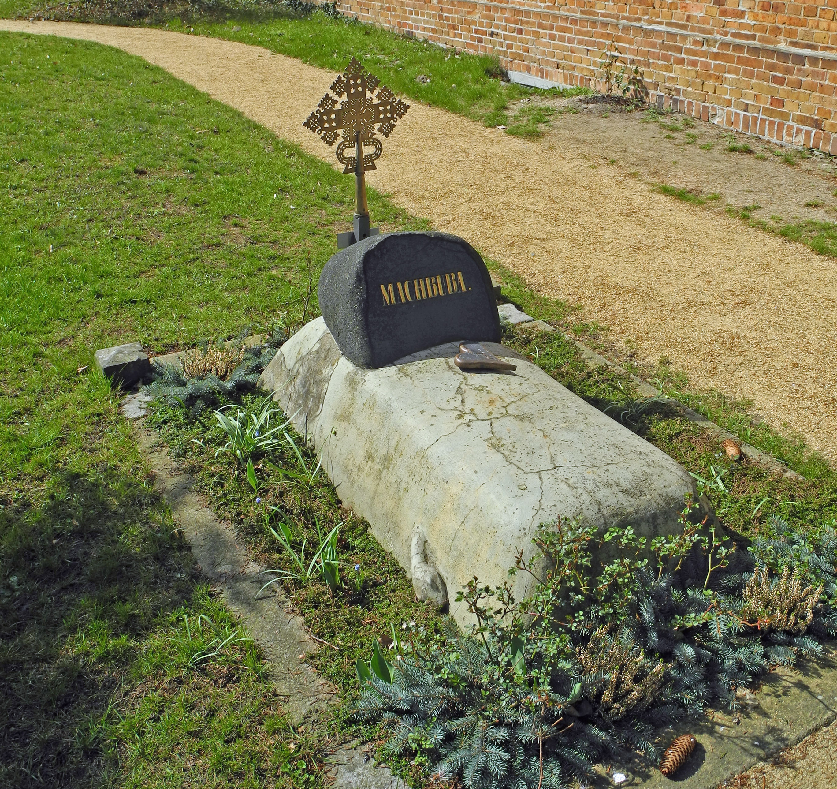 Machbuba-Grab auf dem Kirchhof an der Jakobuskirche in Bad Muskau